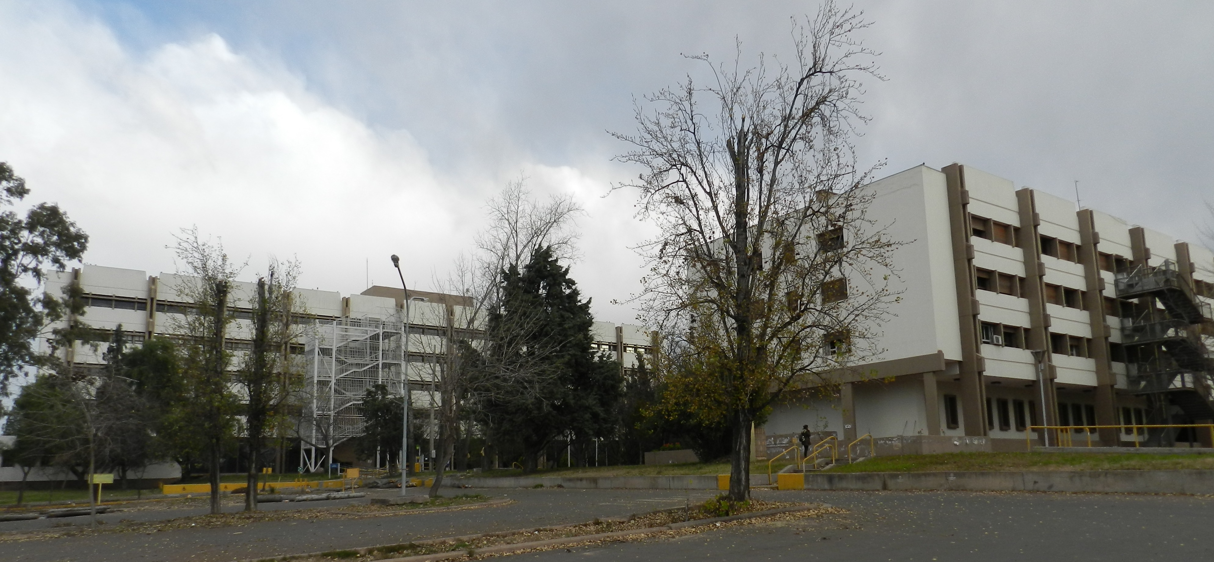 Facultad de Ciencias Económicas